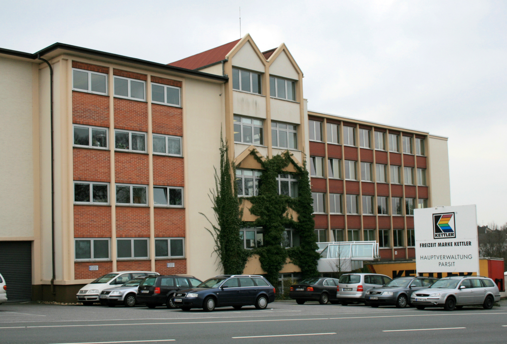 Hauptverwaltung der Firma Kettler in Parsit, Gemeinde Ense.